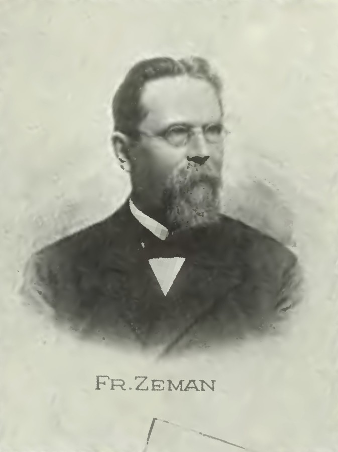 Portrét – František Antonín Zeman (1838-1916), Český spisovatel